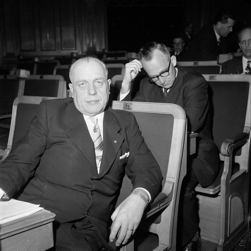 Fridolf Thapper som nyvald talman i andra kammaren 1960.